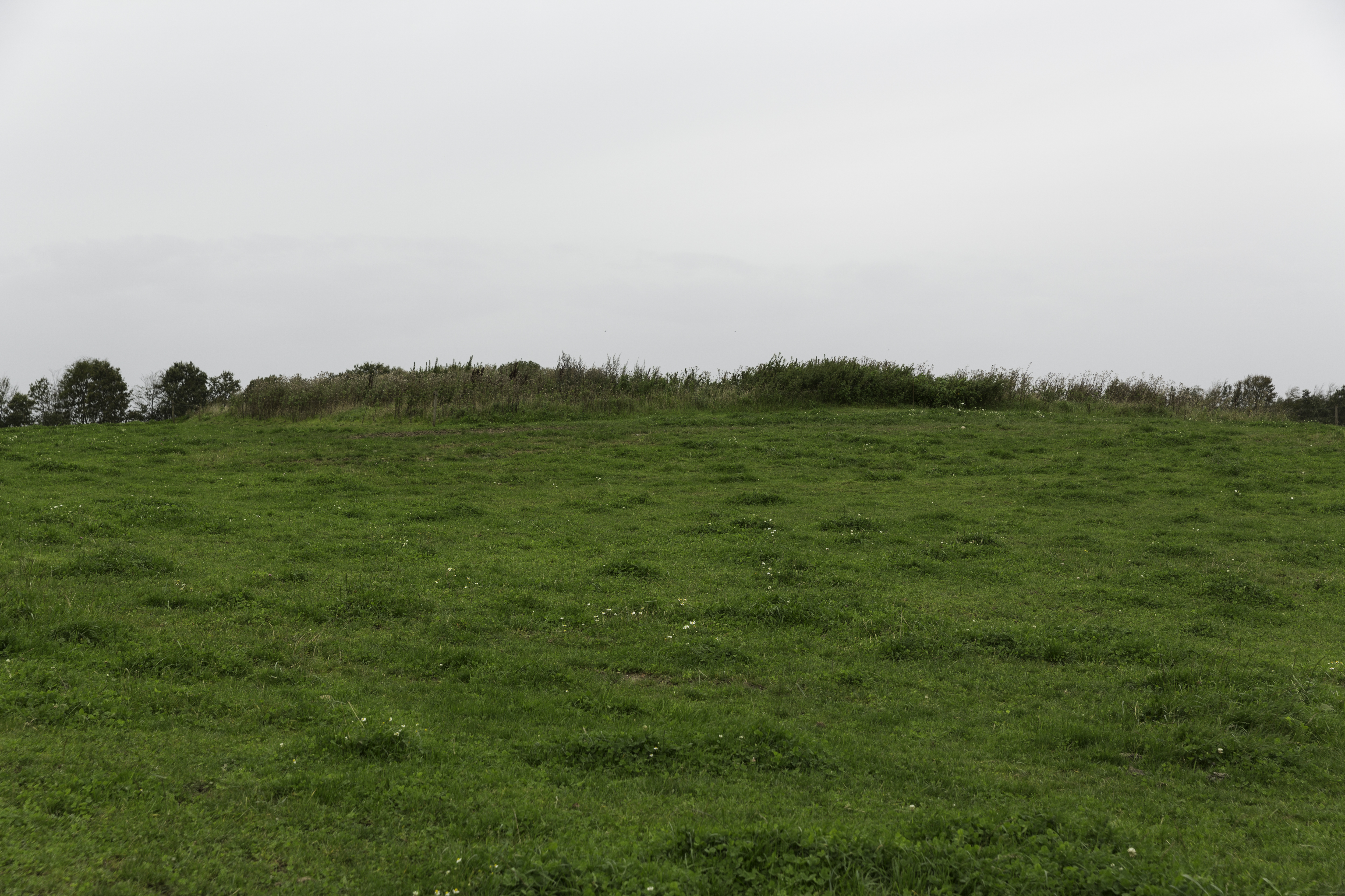 Krejbjerg Kirketomt henligger som en med græs tilvokset forhøjning på en mark